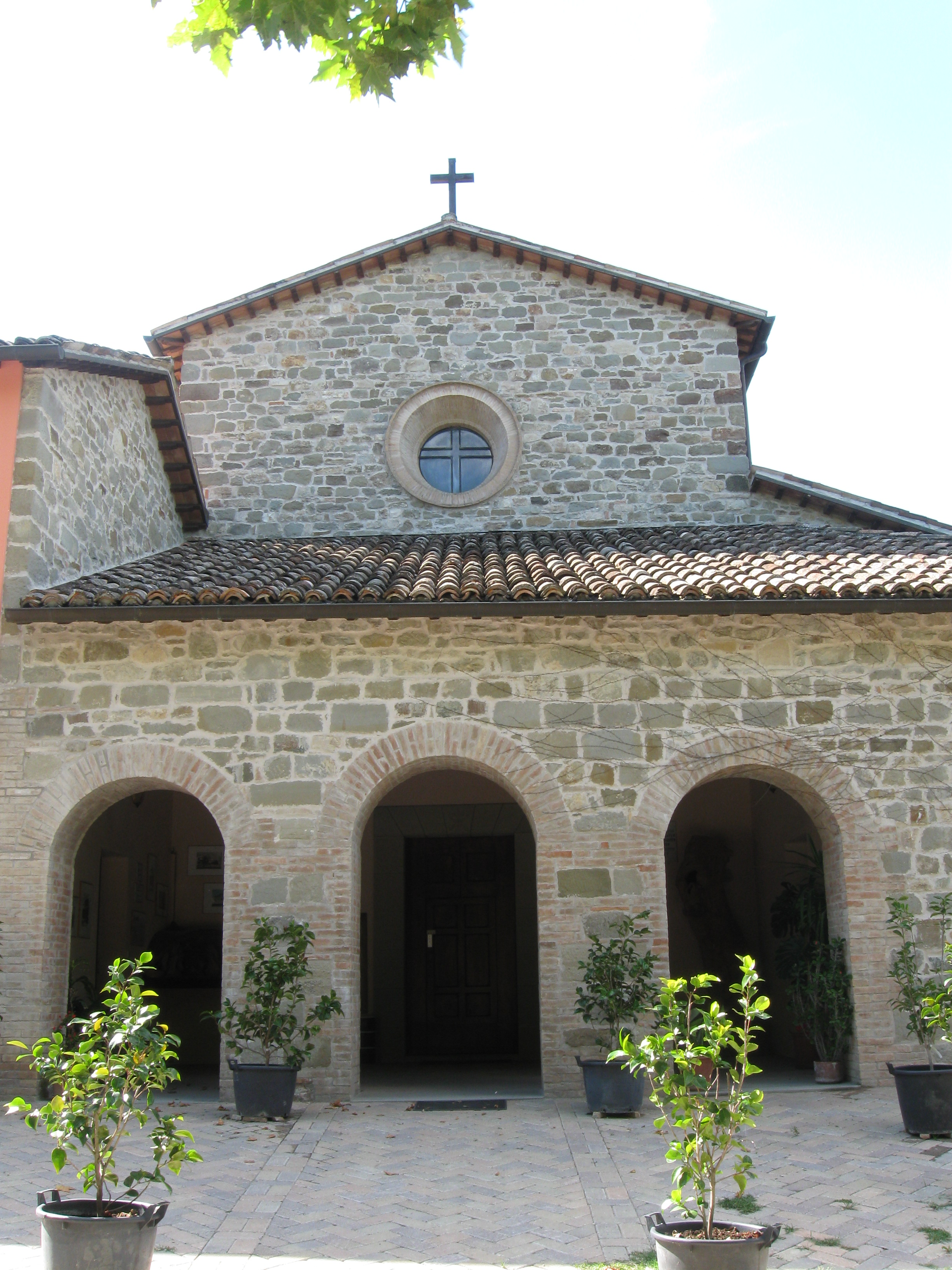 La facciata del santuario della Madonna dei Cappuccini a Sant'Agata Feltria (RN)